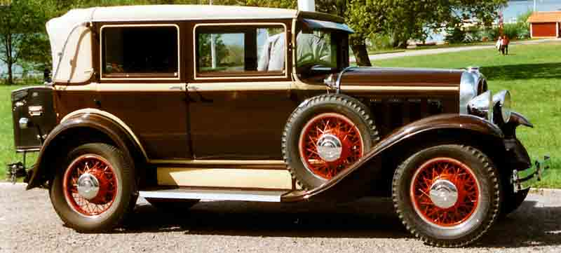 Oakland Model 212 All-American Landaulette Sedan1929